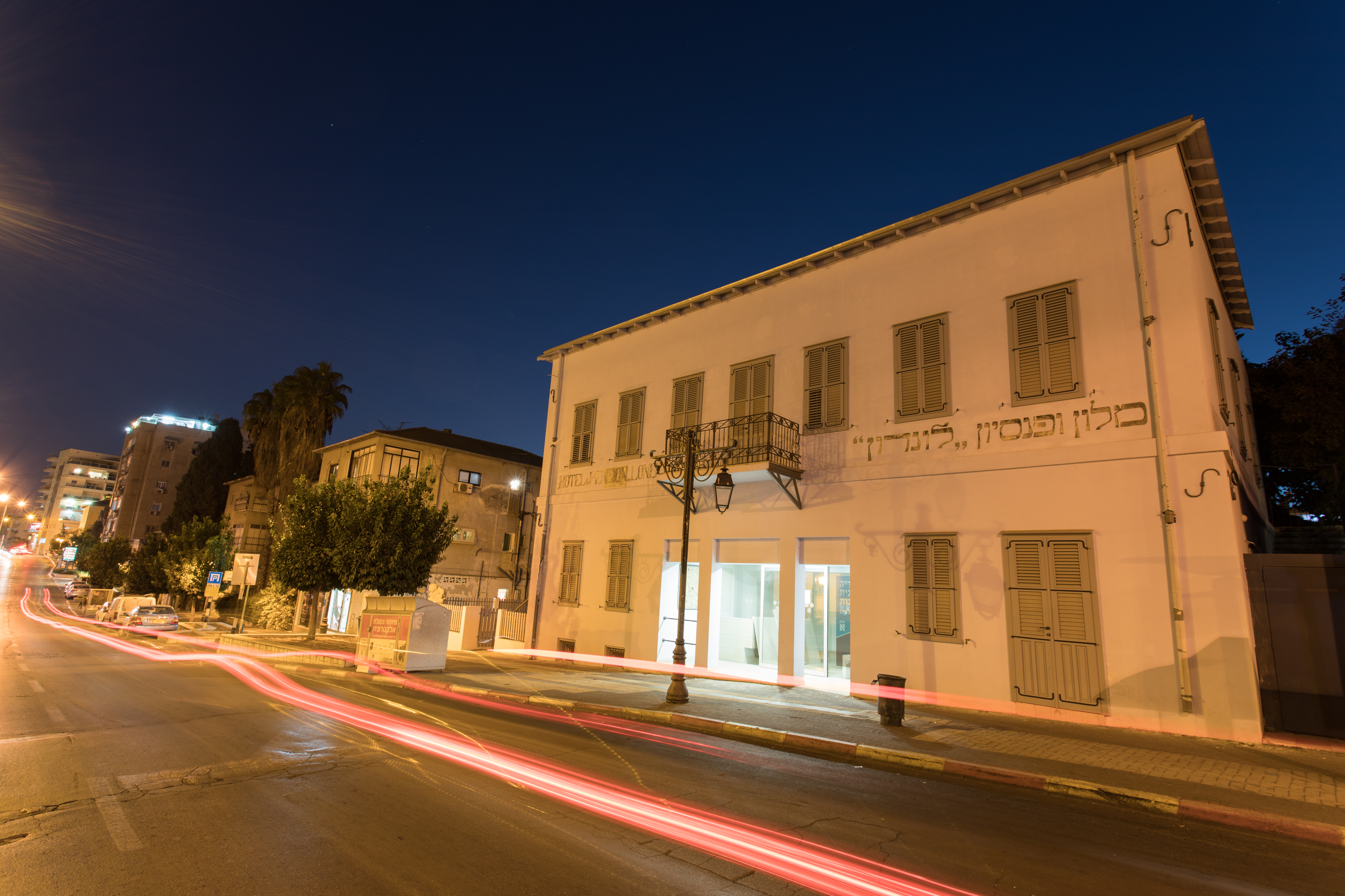 ביתו של אברהם זאב גורדון, לימים מלון לונדון. כיום נטוש ונרכש על ידי עיריית ראשון לציון. סמוך לקריית המוזיאון.